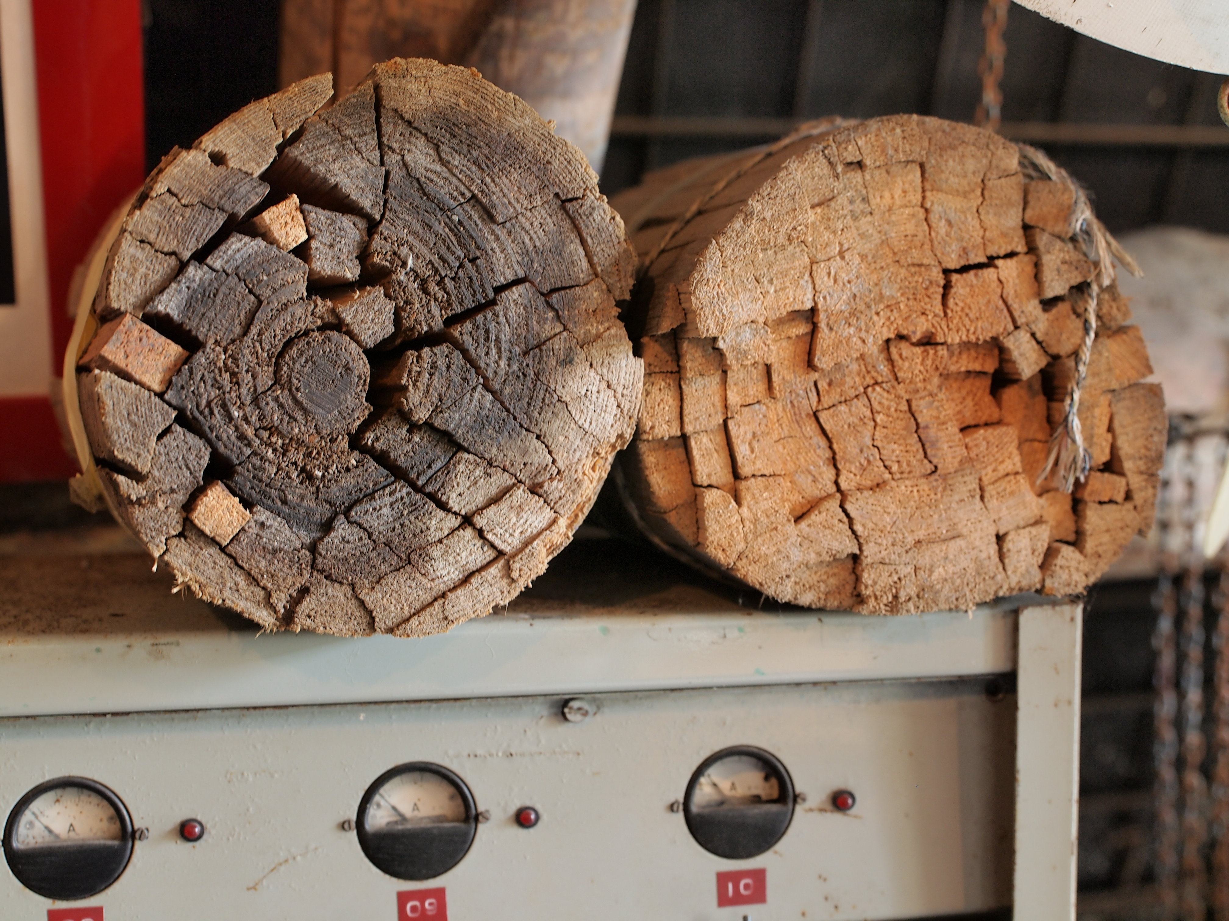 Zeche Nordstern, Gelsenkirchen, Mutterklötzchen im Bergbaustollen (Mutterklötzchen brachten die Bergleute von der Arbeit mit um im Haushalt das Anzünden des Kohleofens zu erleichtern)